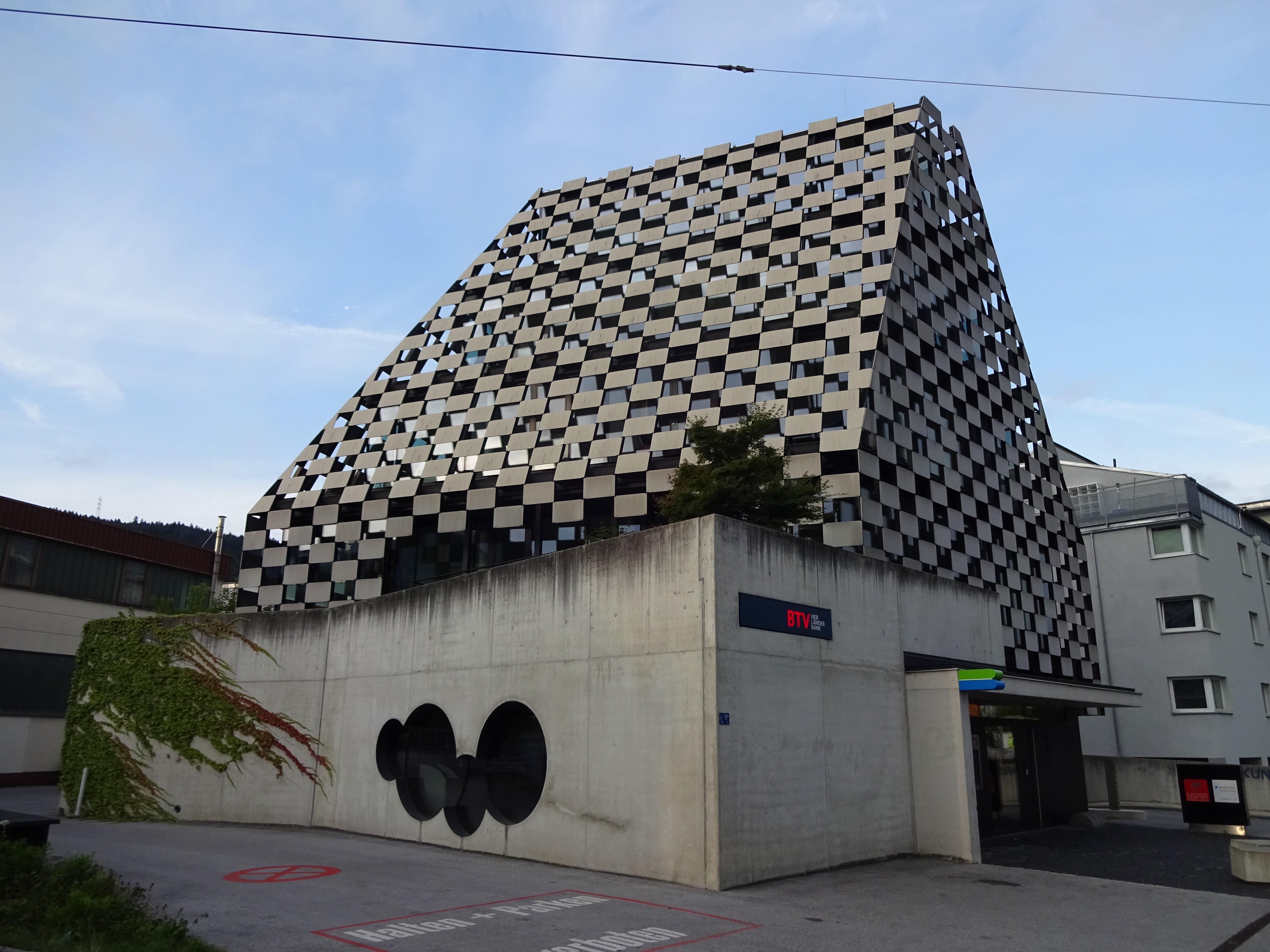 BTV-Zweigstelle Mitterweg, Innsbruck (erbaut nach Plänen von Rainer Köberl, 2011)